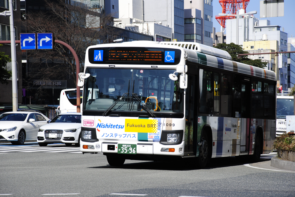 天神付近にて撮影